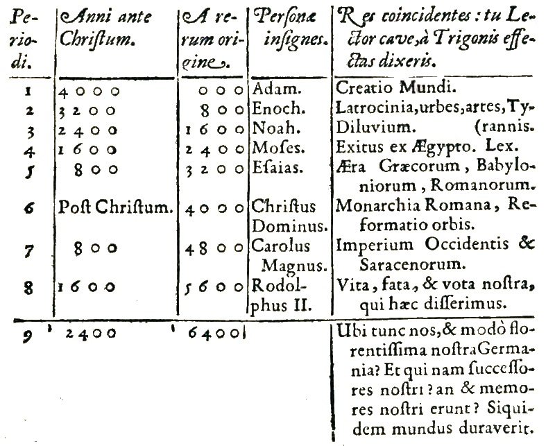 Tableau de la page 29 de "De Stella nova in pede Serpentarii" de Johannes Kepler